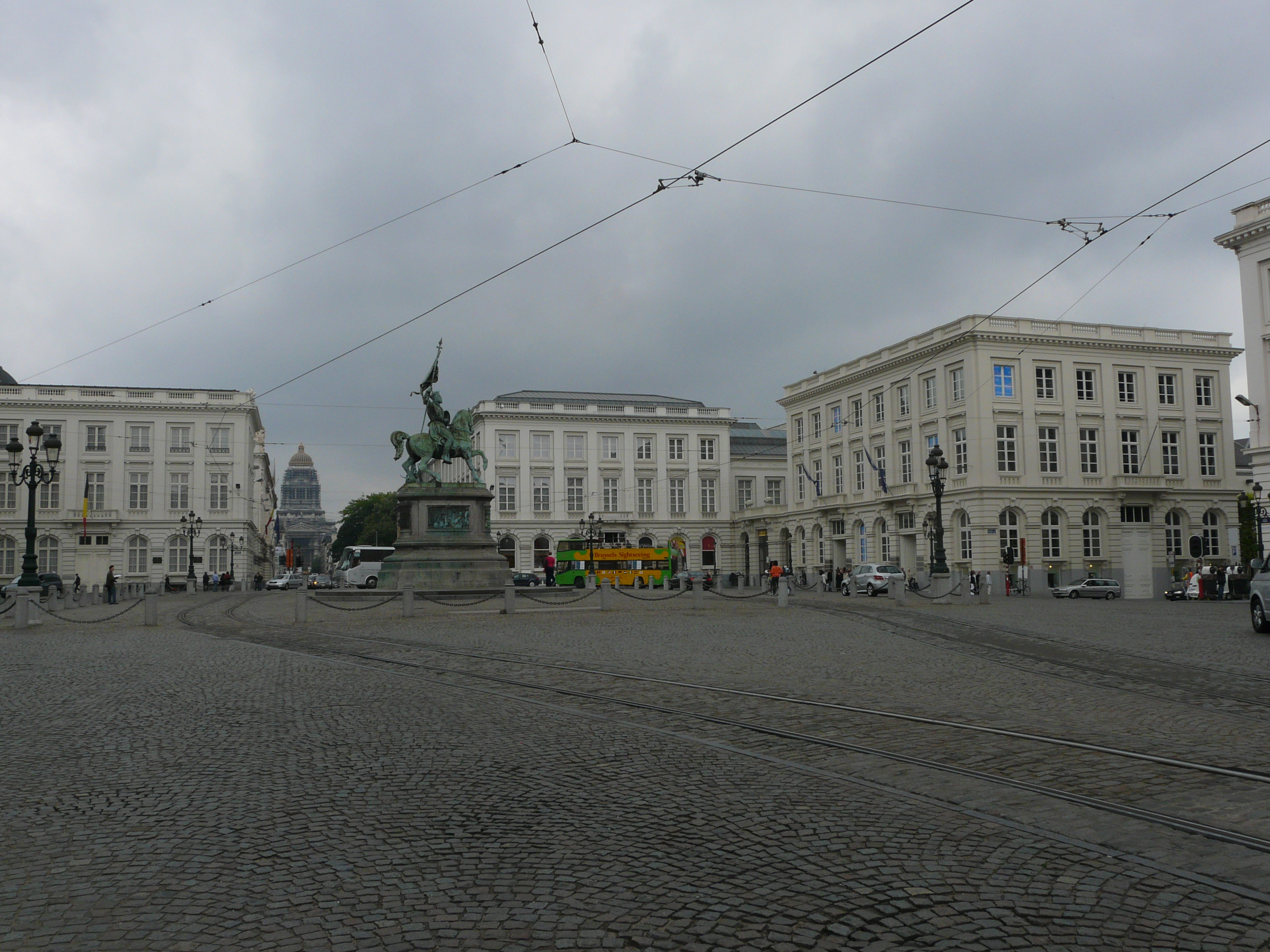 Place Royale, Koningsplein in Brussel